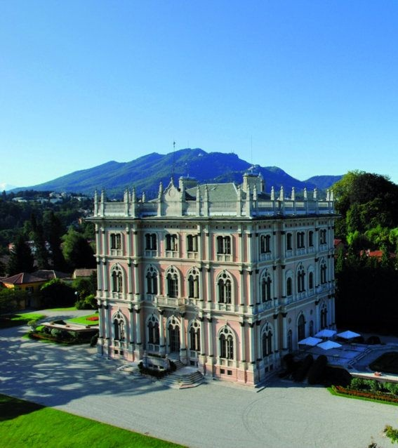 Vista della Villa "Andrea Ponti" nel complesso delle Ville Ponti a Varese, Biumo superiore